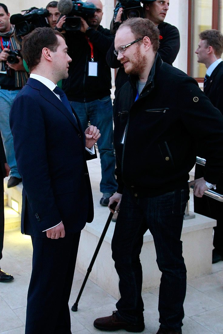 С журналистом газеты «Коммерсант» Олегом Кашиным, который проходит реабилитацию в Израиле.